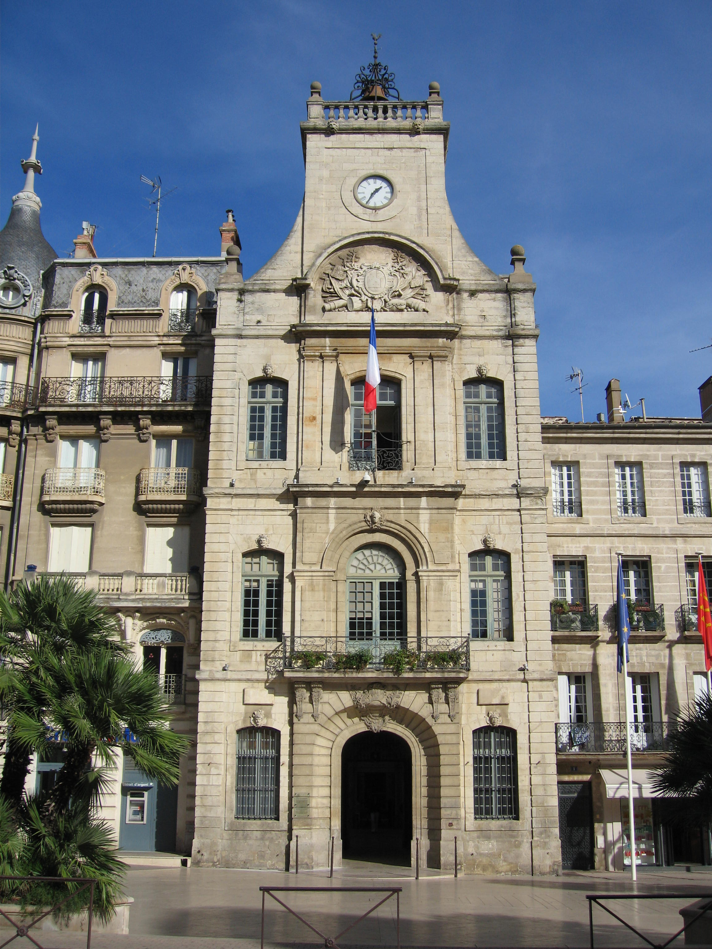 Hôtel de Ville de Béziers, XVIIIe s.